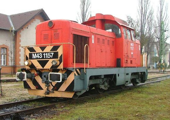 M43 sorozatú dízelmozdony Szolnokon.